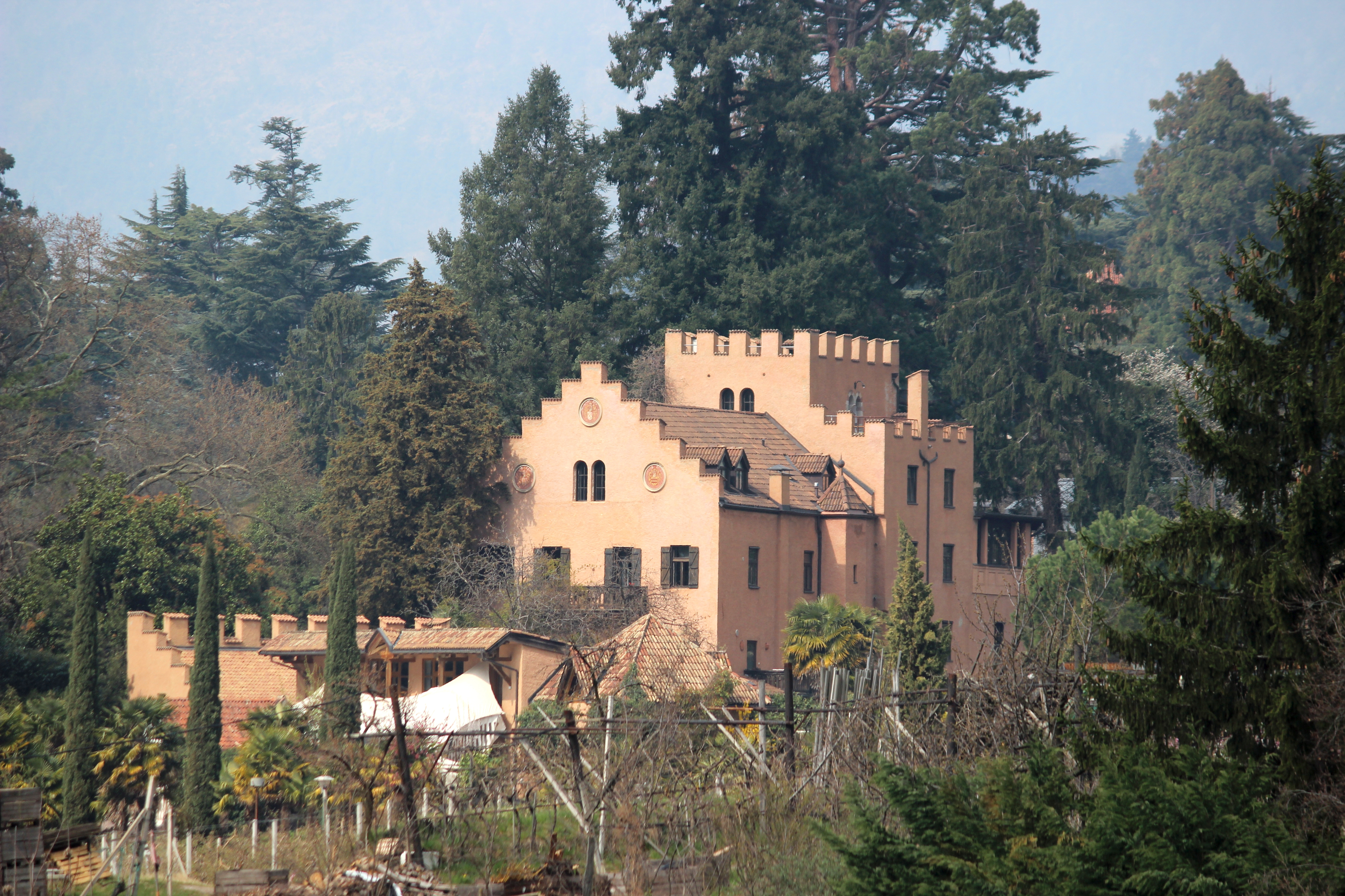 Ansitz Pienzenau in Meran